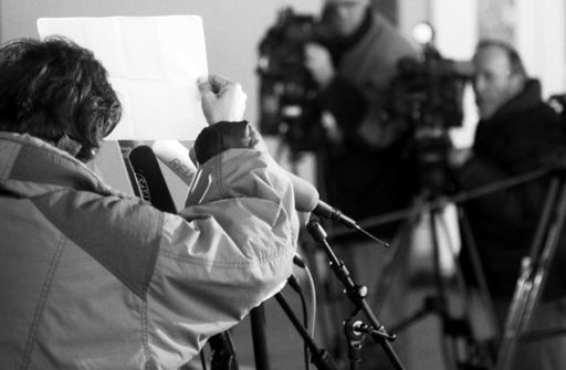 Pressekonferenz auf der Klausurtagung der CSU in Wildbad Kreuth Januar 2000